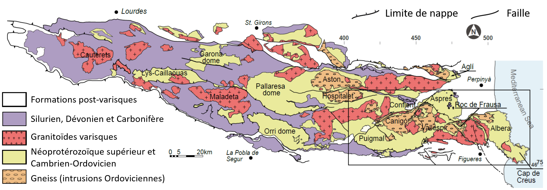 Détail de la Zone Axiale des Pyrénées (sauf Pyrénées Atlantiques à l'ouest et Corbières au nord-est).